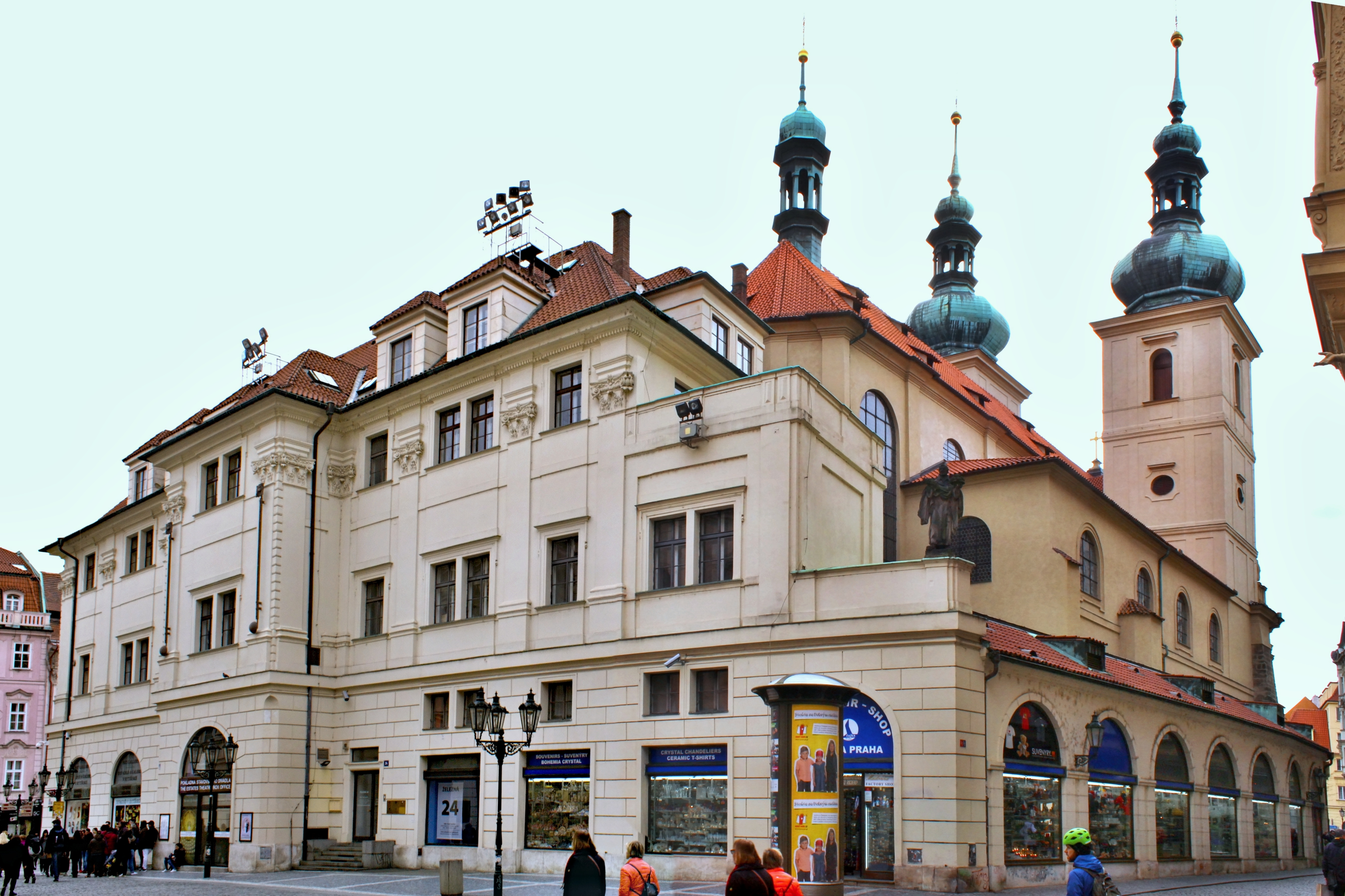 Staroměstský karmelitánský klášter u sv. Havla